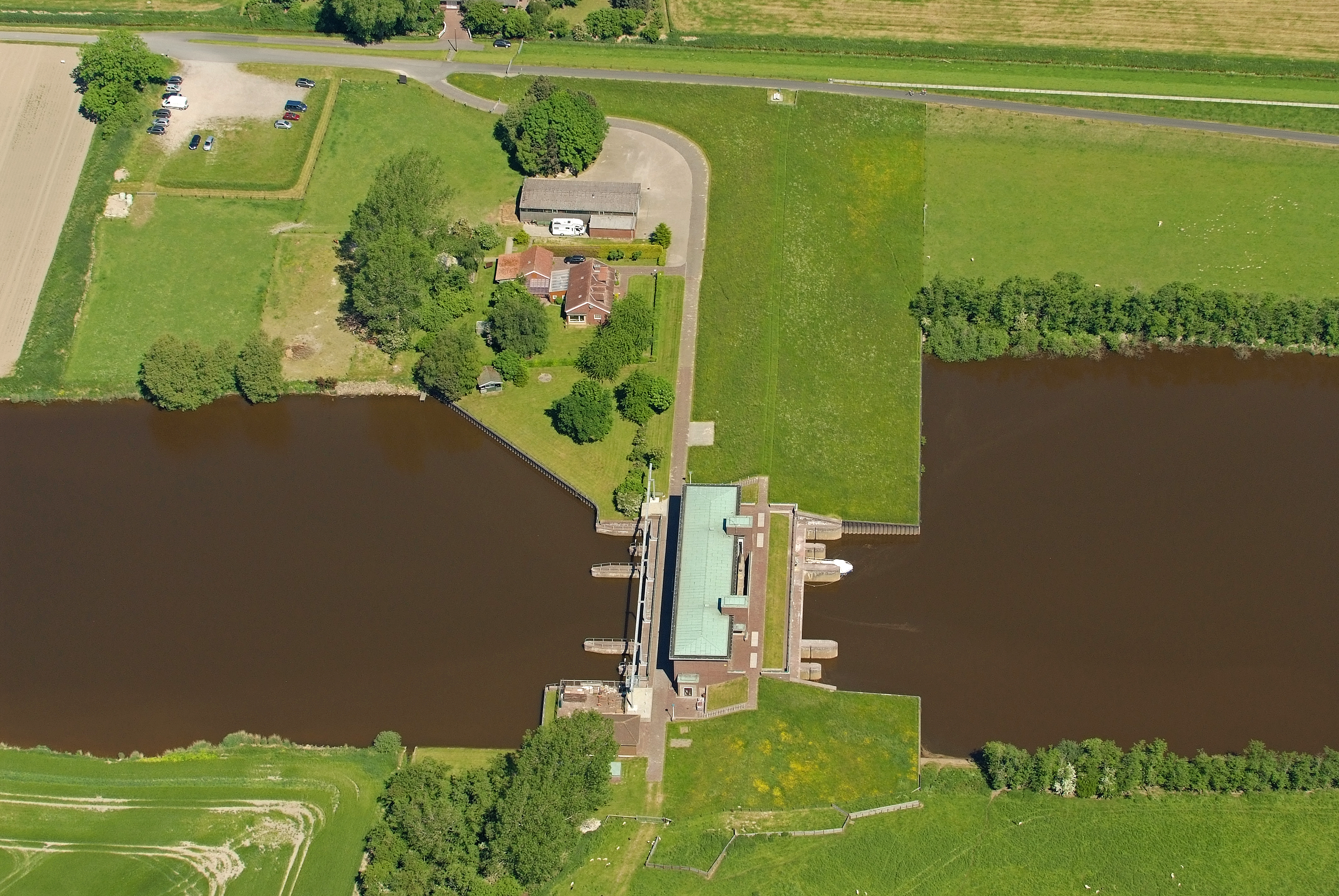 Schöpfwerk Petershörn Fotoflug vom Flugplatz Nordholz-Spieka über Cuxhaven und Wilhelmshaven